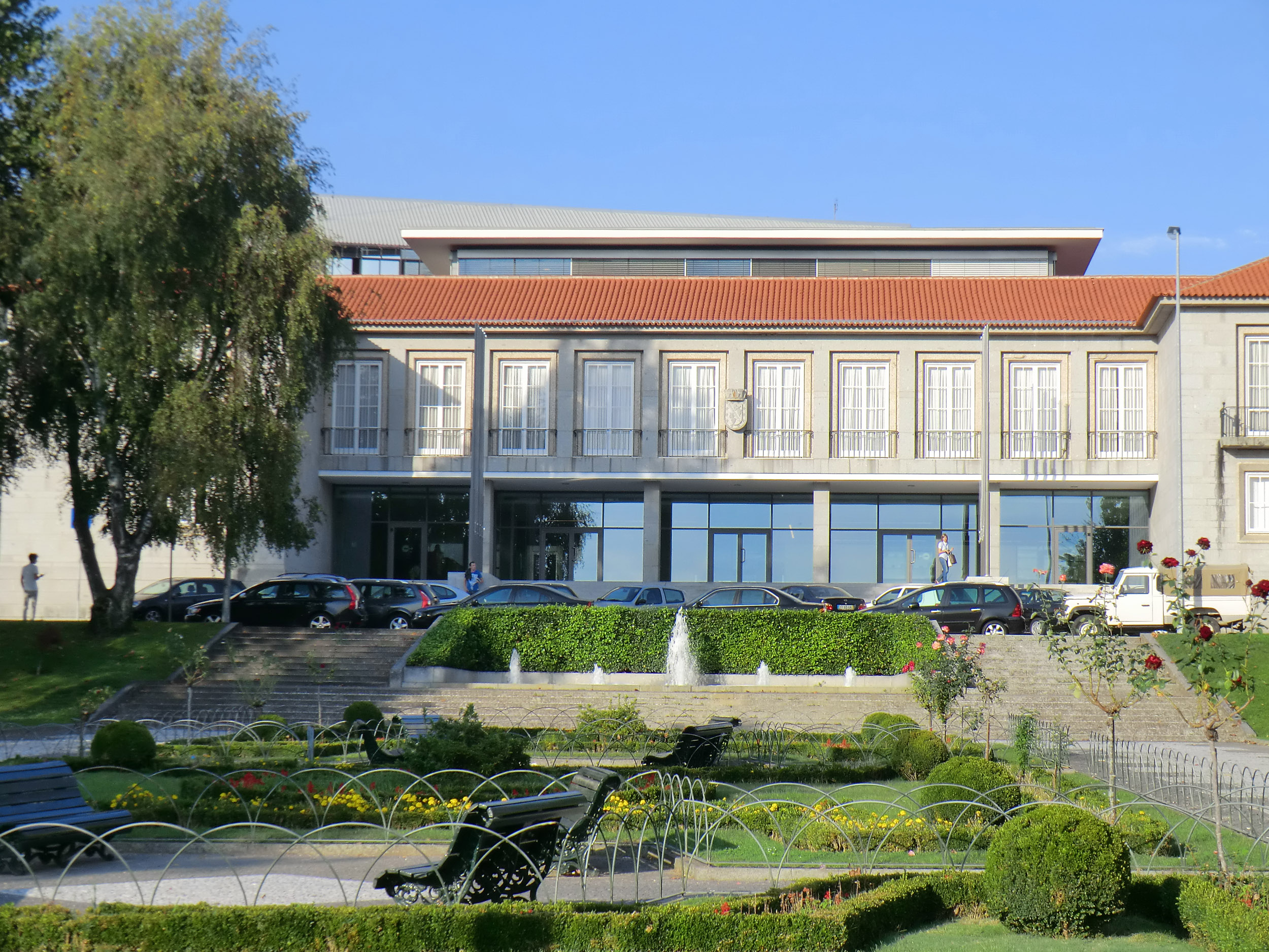 Câmara Municipal de Felgueiras This file was uploaded for Wiki Loves Monuments in Portugal with the unique identifier 97022194.